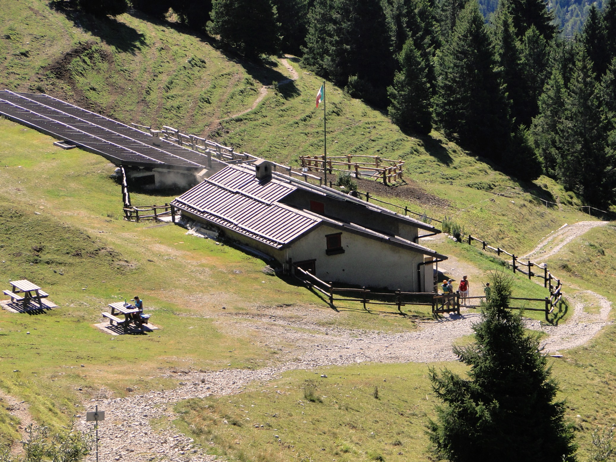 Rifugio Malga Cassinelli, Prealpi bergamasche. Castione della Presolana (BG)